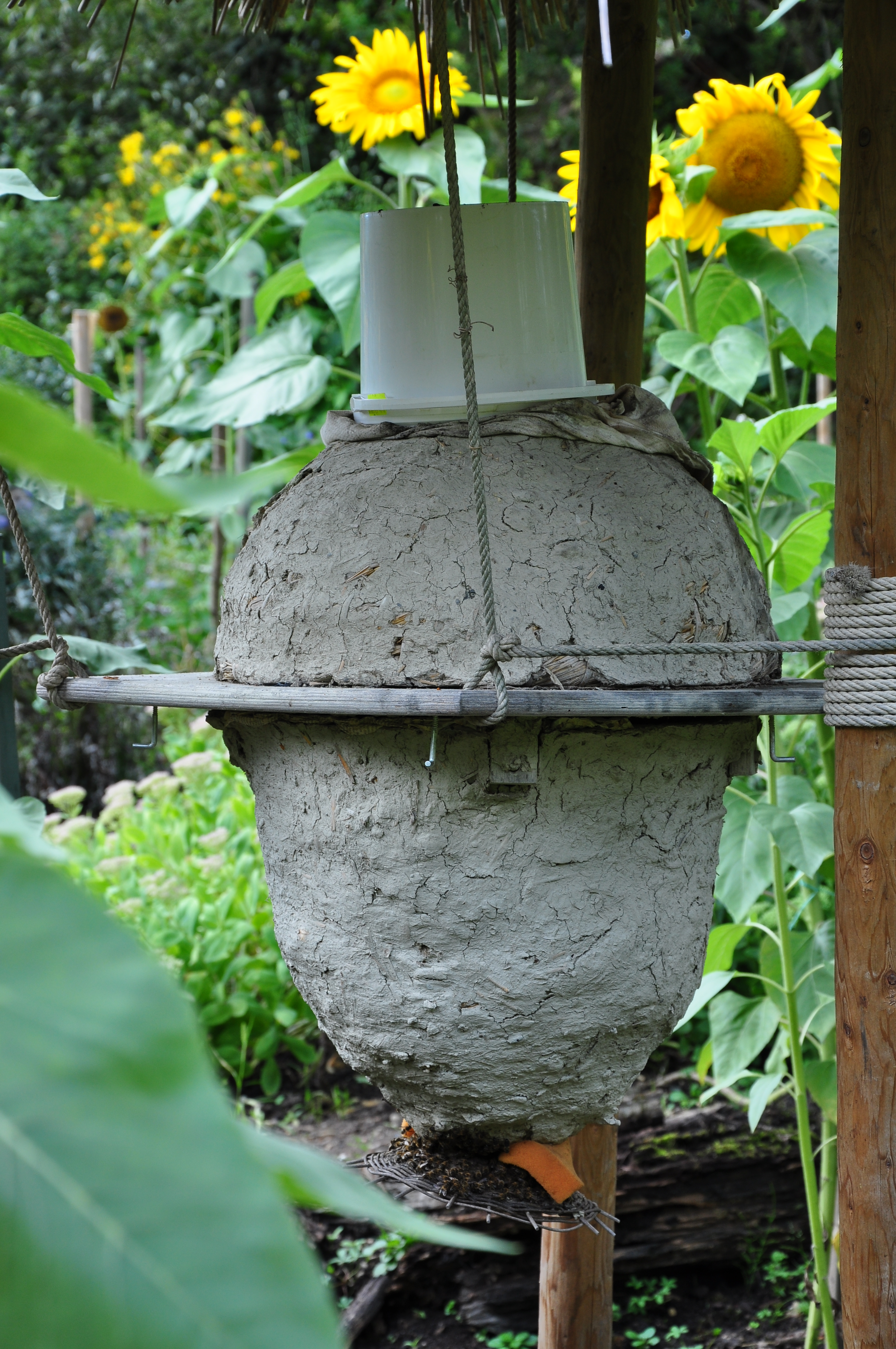 Botanischer Garten der Universität Zürich in Zürich-Weinegg (Switzerland) : Apoidea